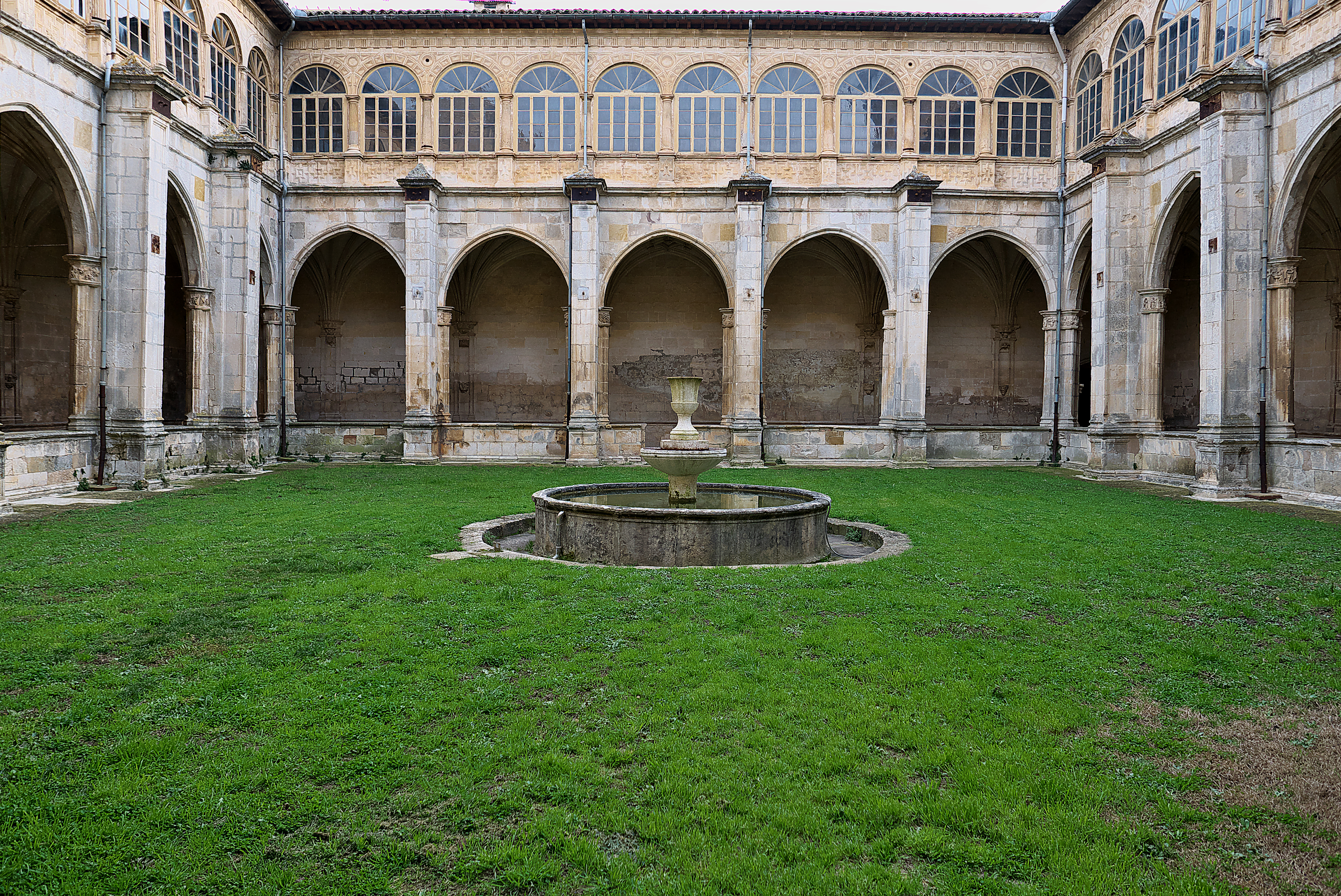 Martín de Oyarzábal (†1545) proyecta un claustro con características renacentista, aunque emplea otras góticas (h. 1540). También colaboran, Juan Pérez de Solarte, Martín de Landerrain y Martín de Larrate.